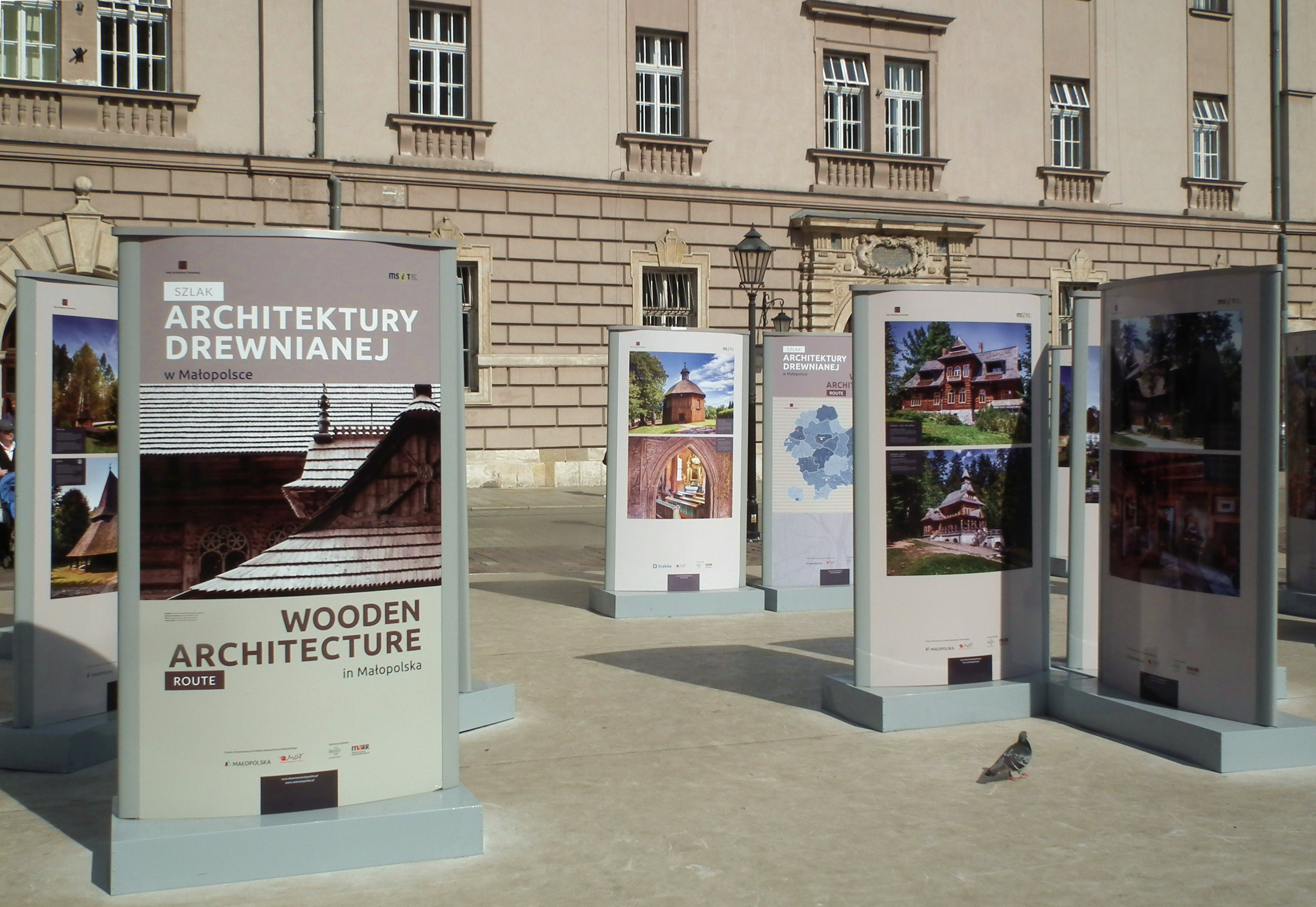 Szlak Architektury Drewnianej, Kraków - promocja.